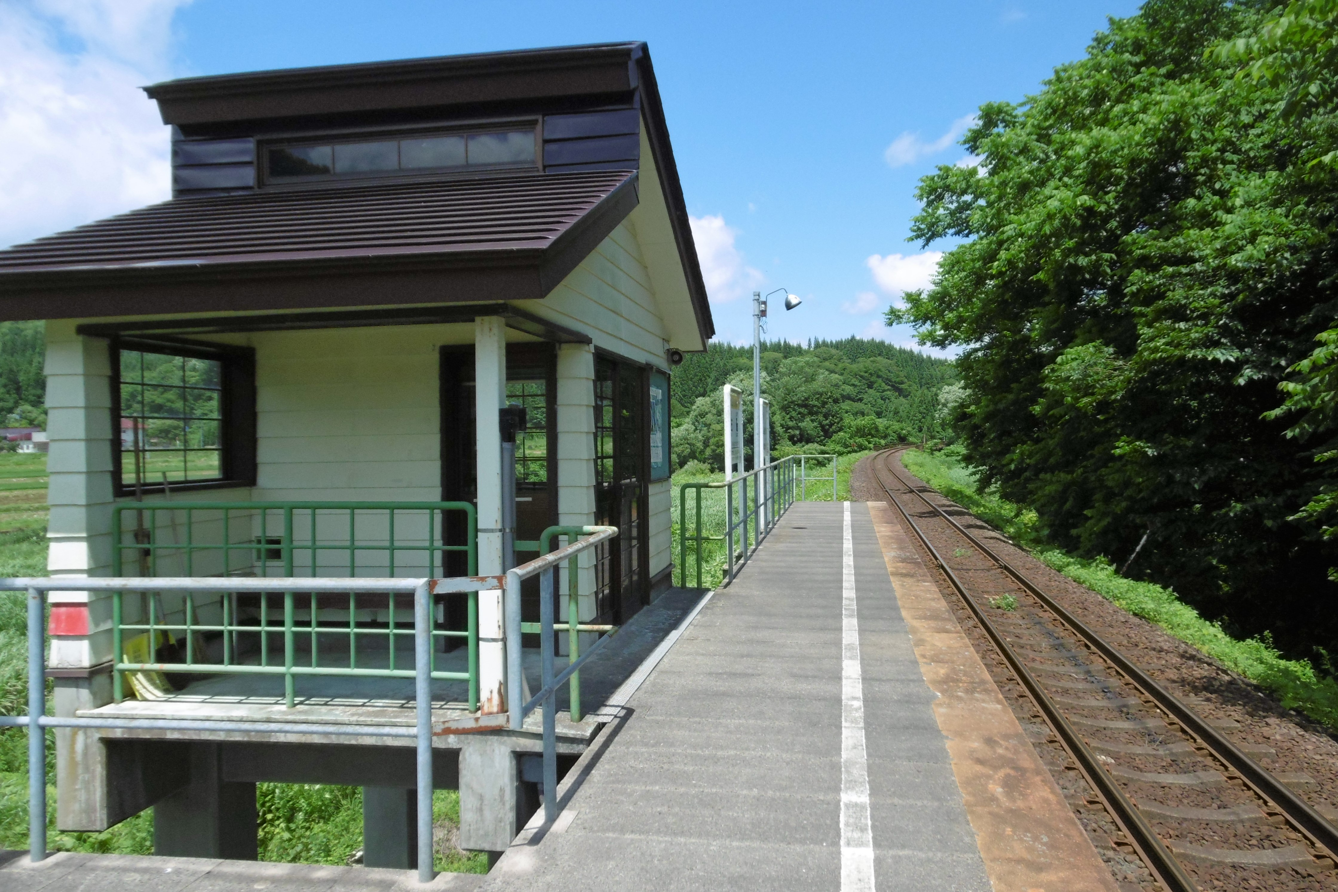 秋田内陸線・左通駅 鷹巣方向を望む：秋田県仙北市西木町